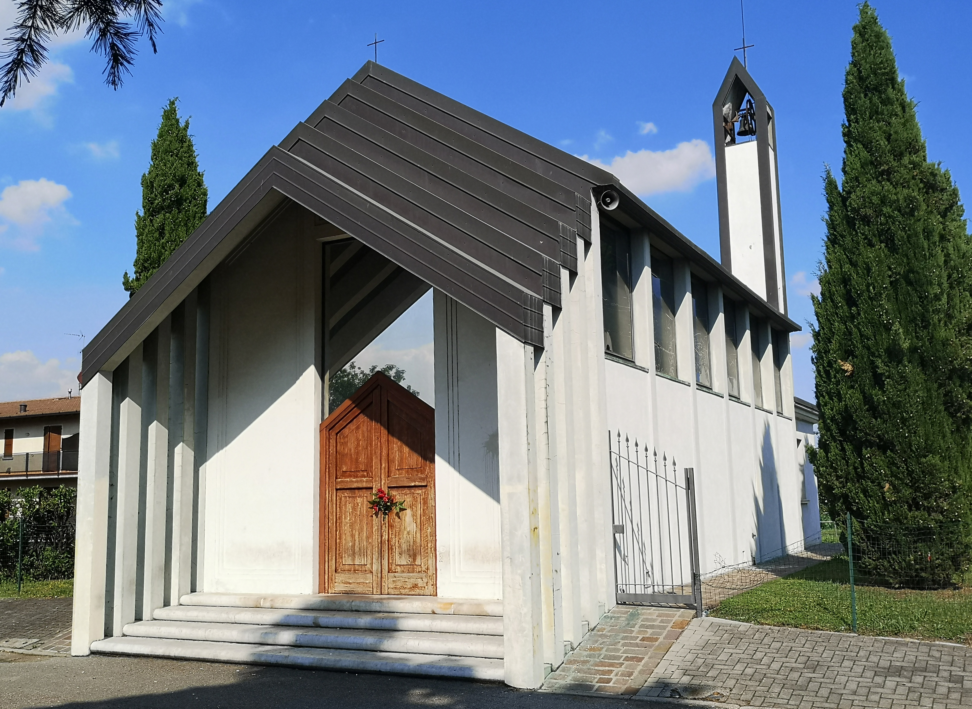 Chiesa di Fatima a Travagliato